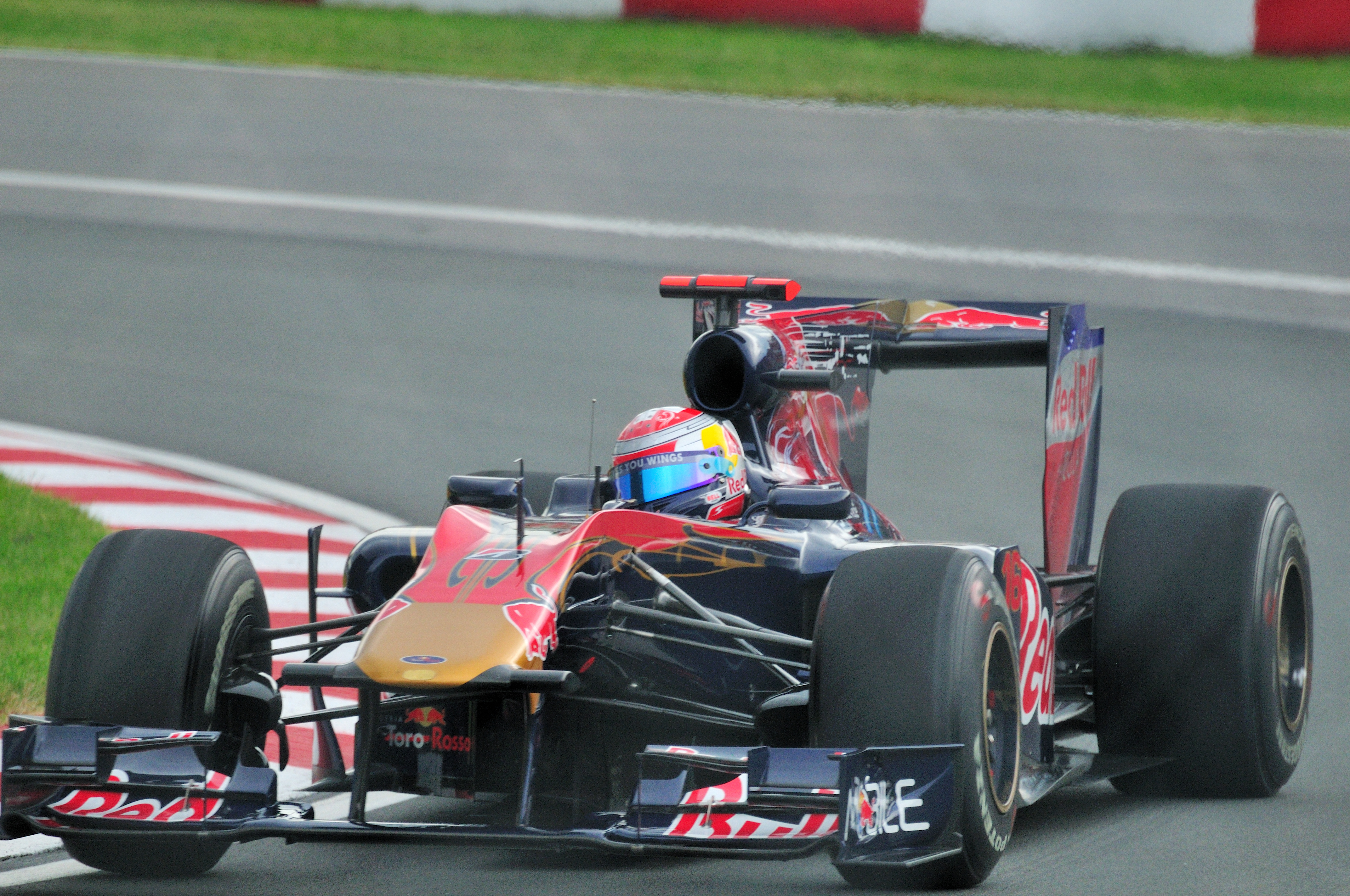 Toro Rosso driver Sebastien Buemi (2010 Montreal GP)